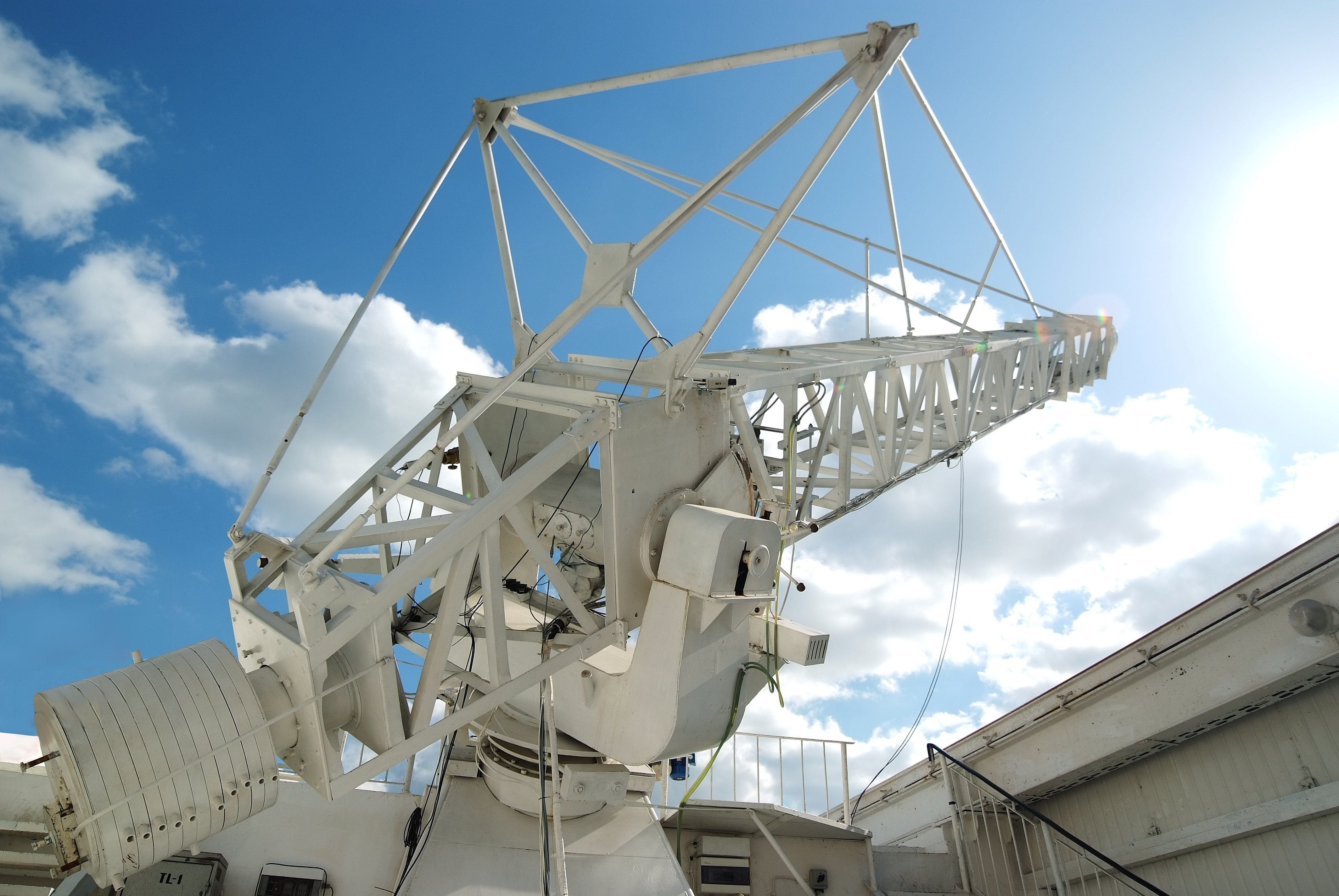 Koronograf w trakcie obserwacji Słońca w Obserwatorium Astronomicznym UWr.